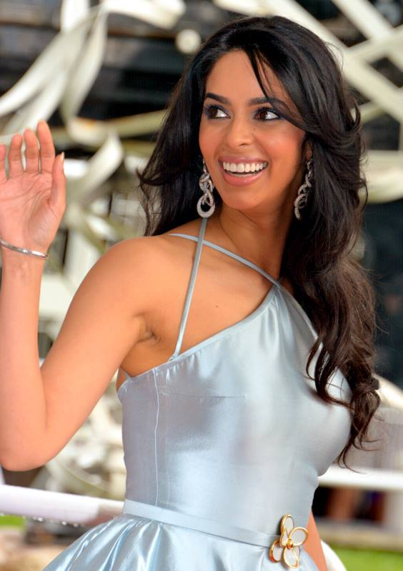 Mallika Sherawat au festival de Cannes